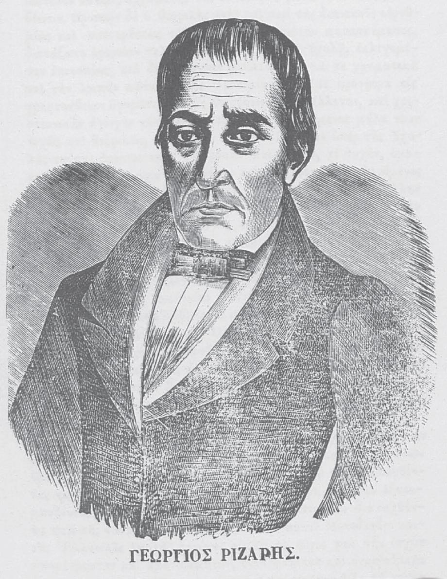 Griechischer Gelehrter, 19. Jahrhundert